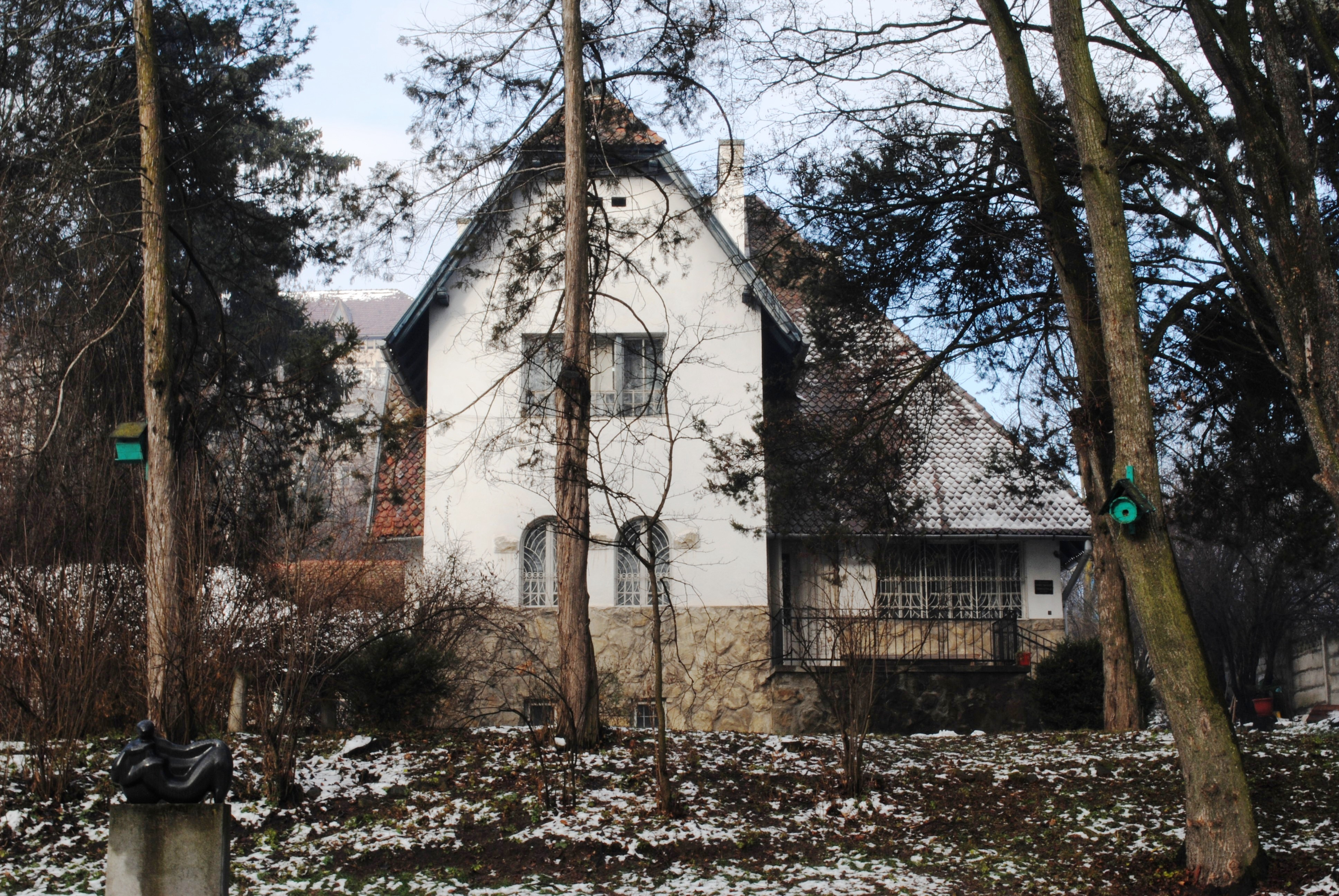 Ansamblul Muzeului Național Secuiesc, 1911 - 1913